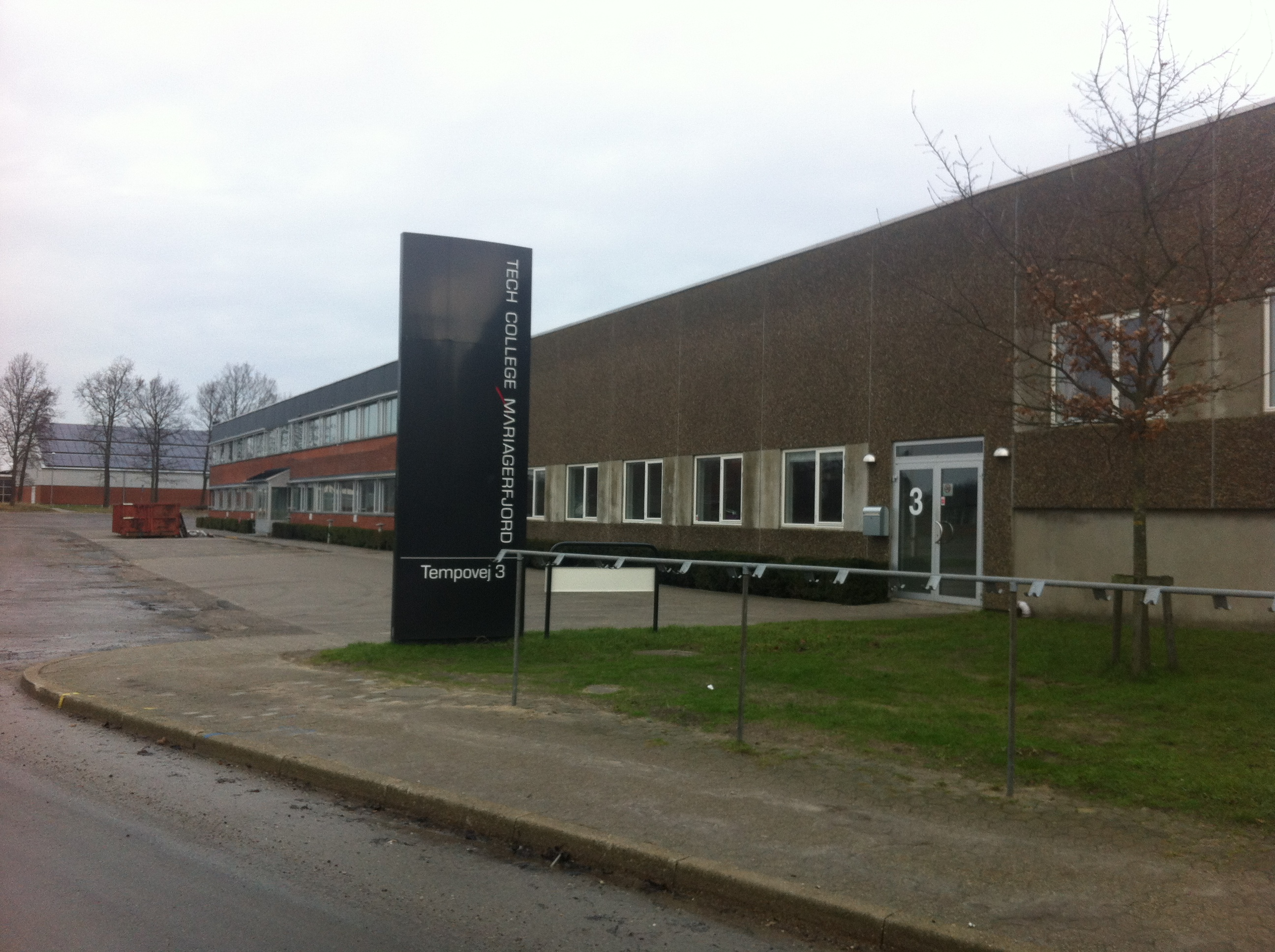 Tech College Mariagerfjord, Tempovej 3, 9560 Hadsund.